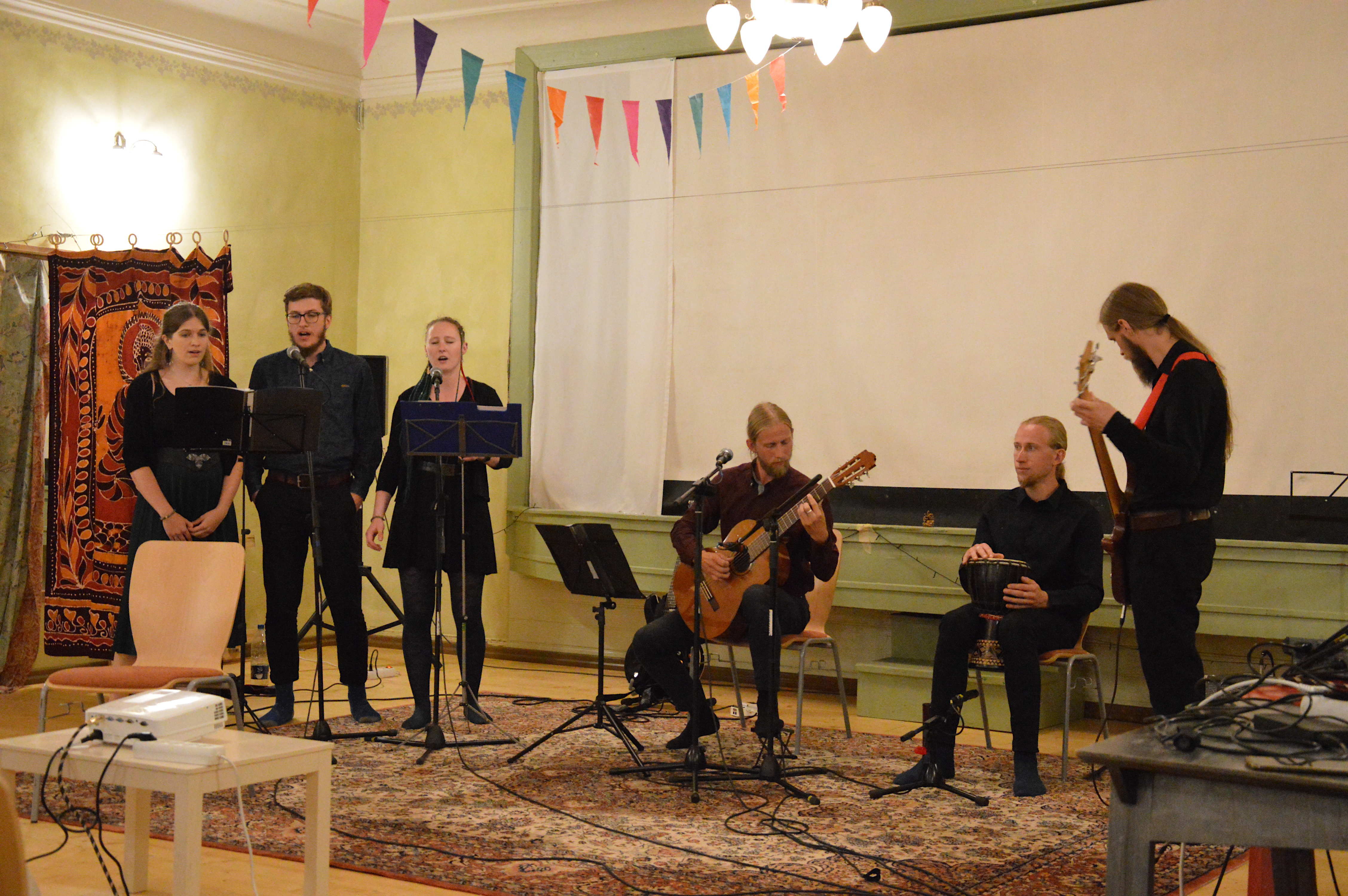 Soome-ugri ansambel Kännu Peal Käbi esinemas Sänna mõisas soome-ugri filmifestivalil